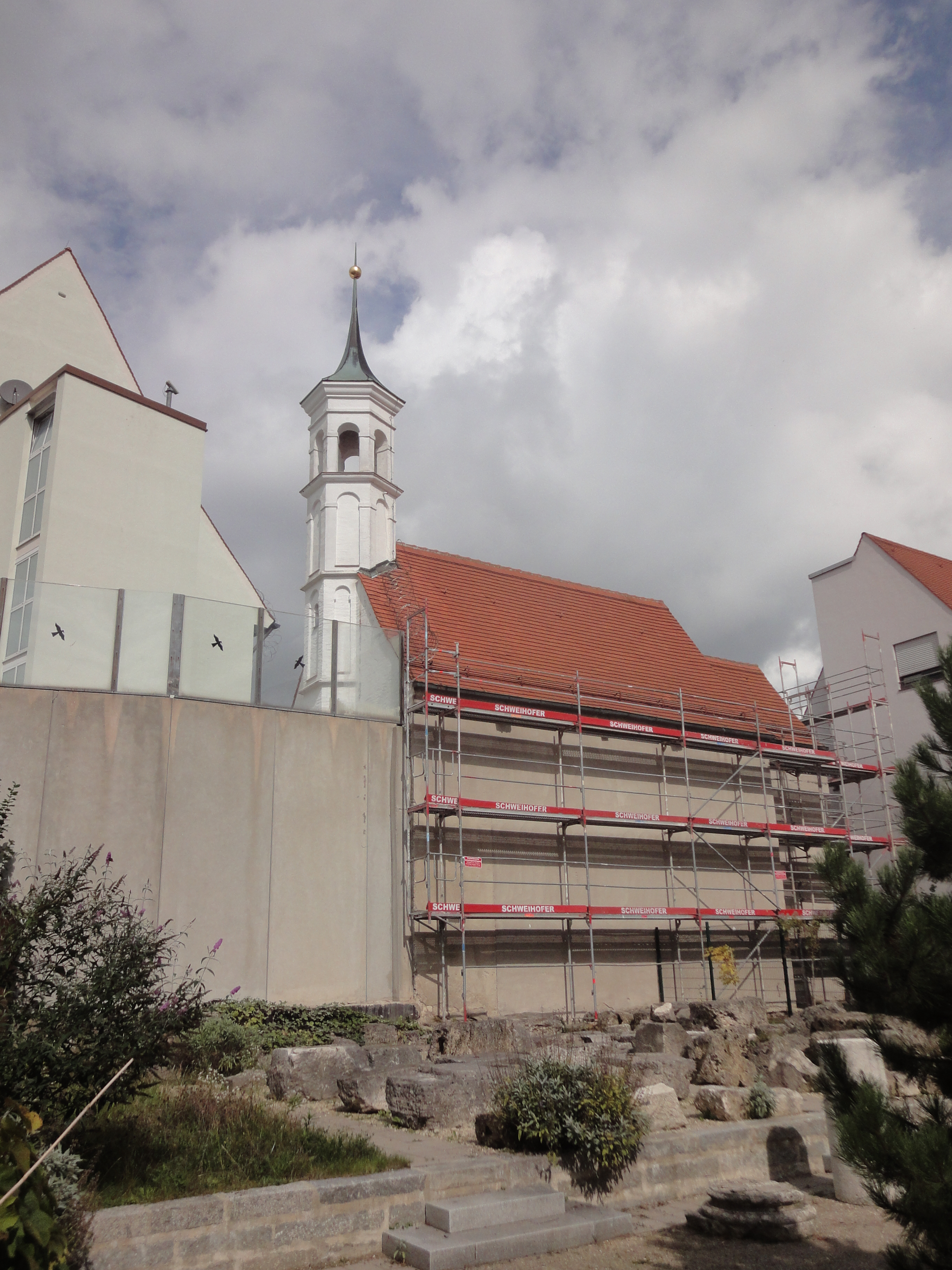 Nordansicht, fotografiert auf dem Gelände des Archäologischen Gartens Augsburg, Pfaffengäßchen.